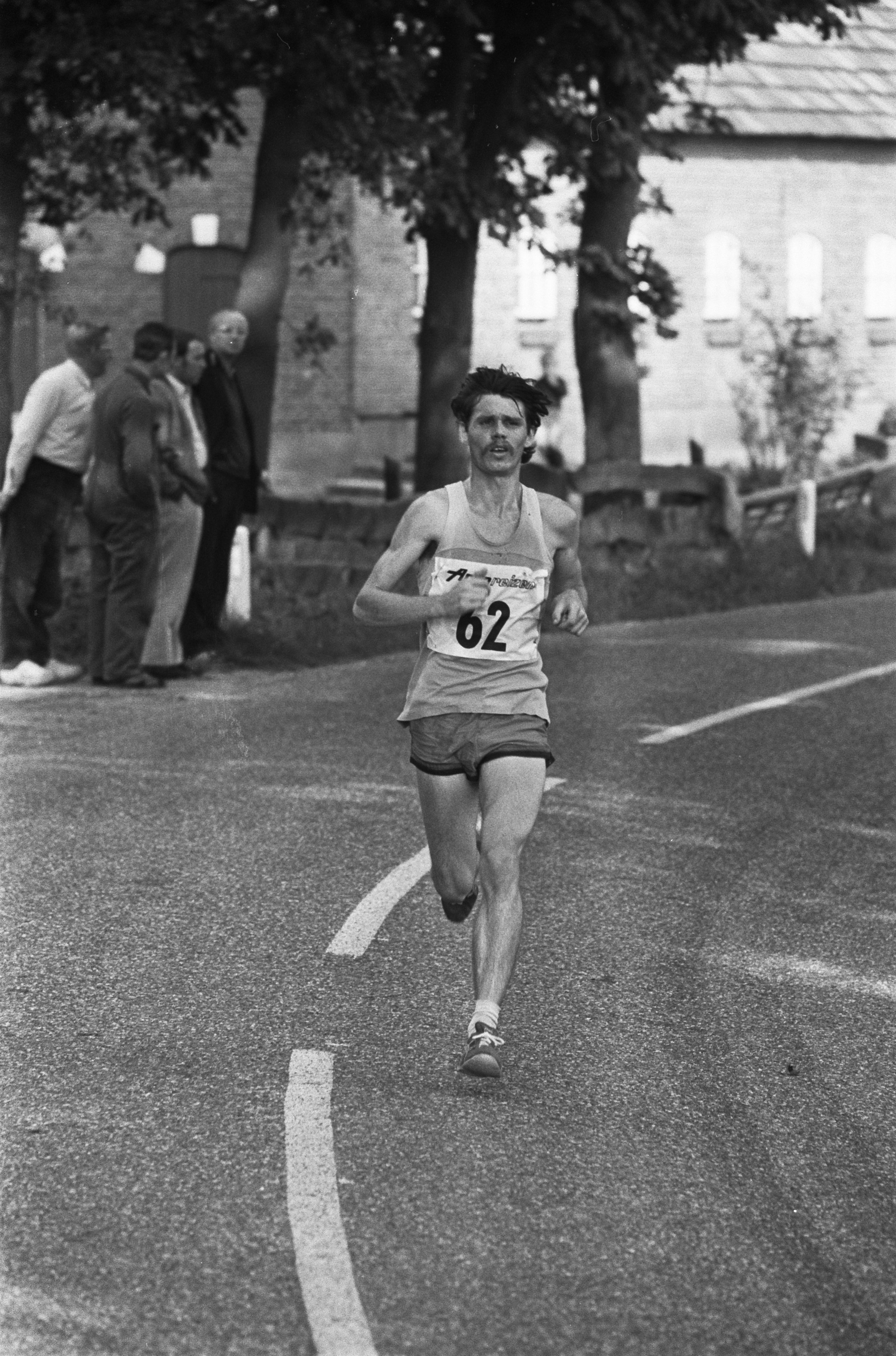 Collectie / Archief : Fotocollectie Anefo Reportage / Serie : [ onbekend ] Beschrijving : Marathon te Enschede, Allen in actie Datum : 4 september 1971 Locatie : Enschede Trefwoorden : MARATHONS Fotograaf : Peters, Hans / Anefo Auteursrechthebbende : Nationaal Archief Materiaalsoort : Negatief (zwart/wit) Nummer archiefinventaris : bekijk toegang 2.24.01.05 Bestanddeelnummer : 924-9045